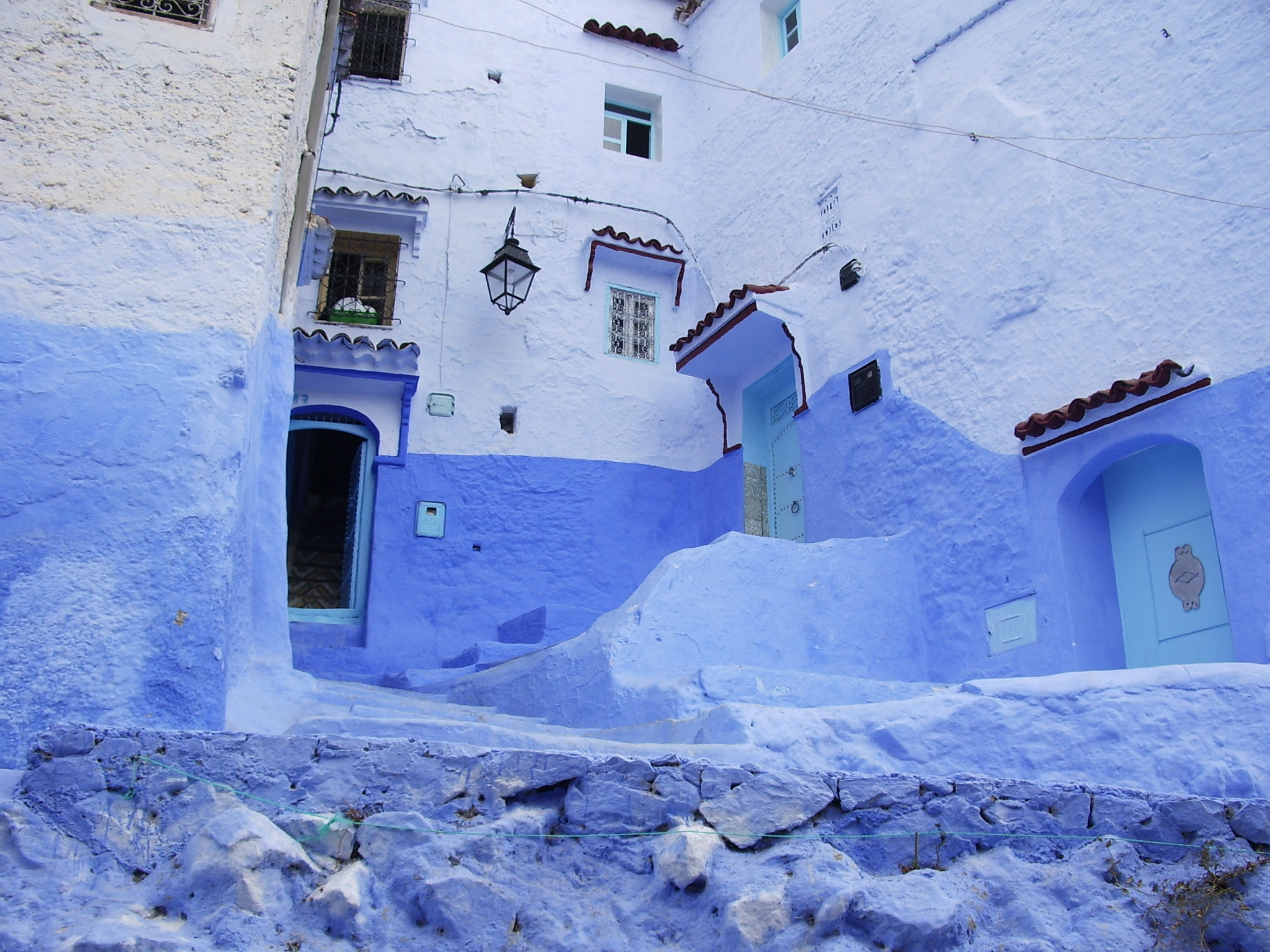 Golygfa ym medina Chefchaouen.